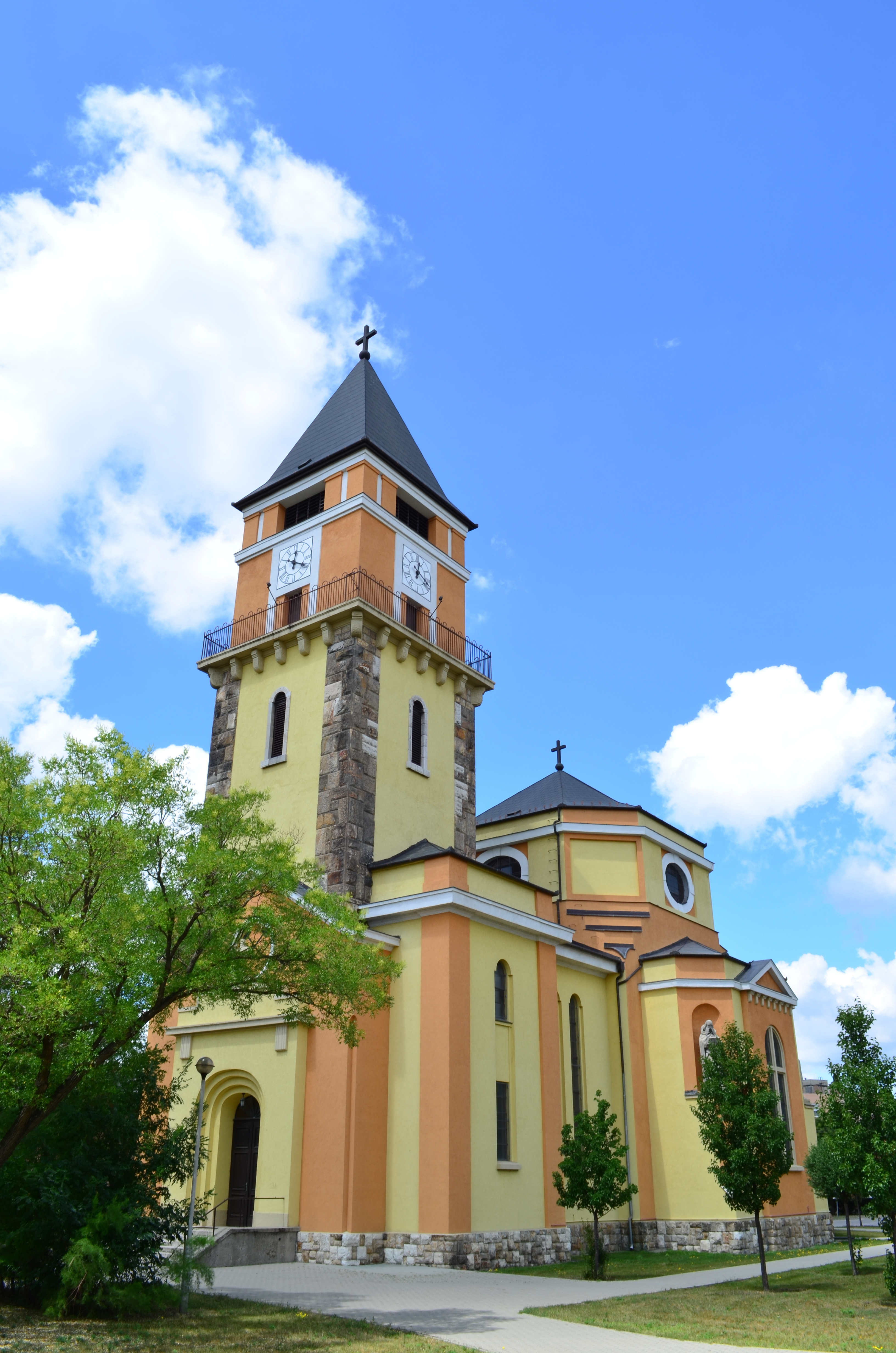 A dorogi Szent Borbála-bányásztemplom.